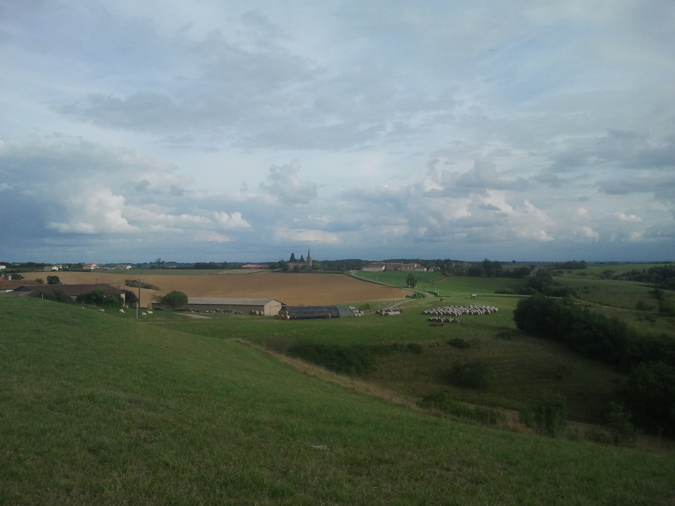 Vue générale de Traversères